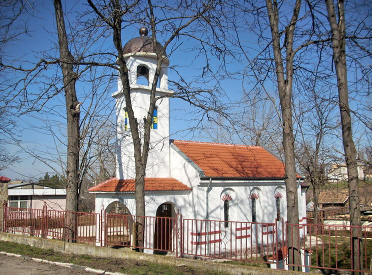 Православният храм на кв. Невски (Попово) през пролетта на 2010 г.